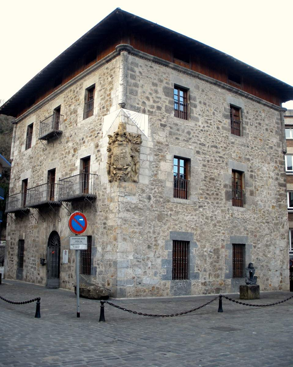 Casa Torre de los Alzola, en Elgoibar (Gipuzkoa)